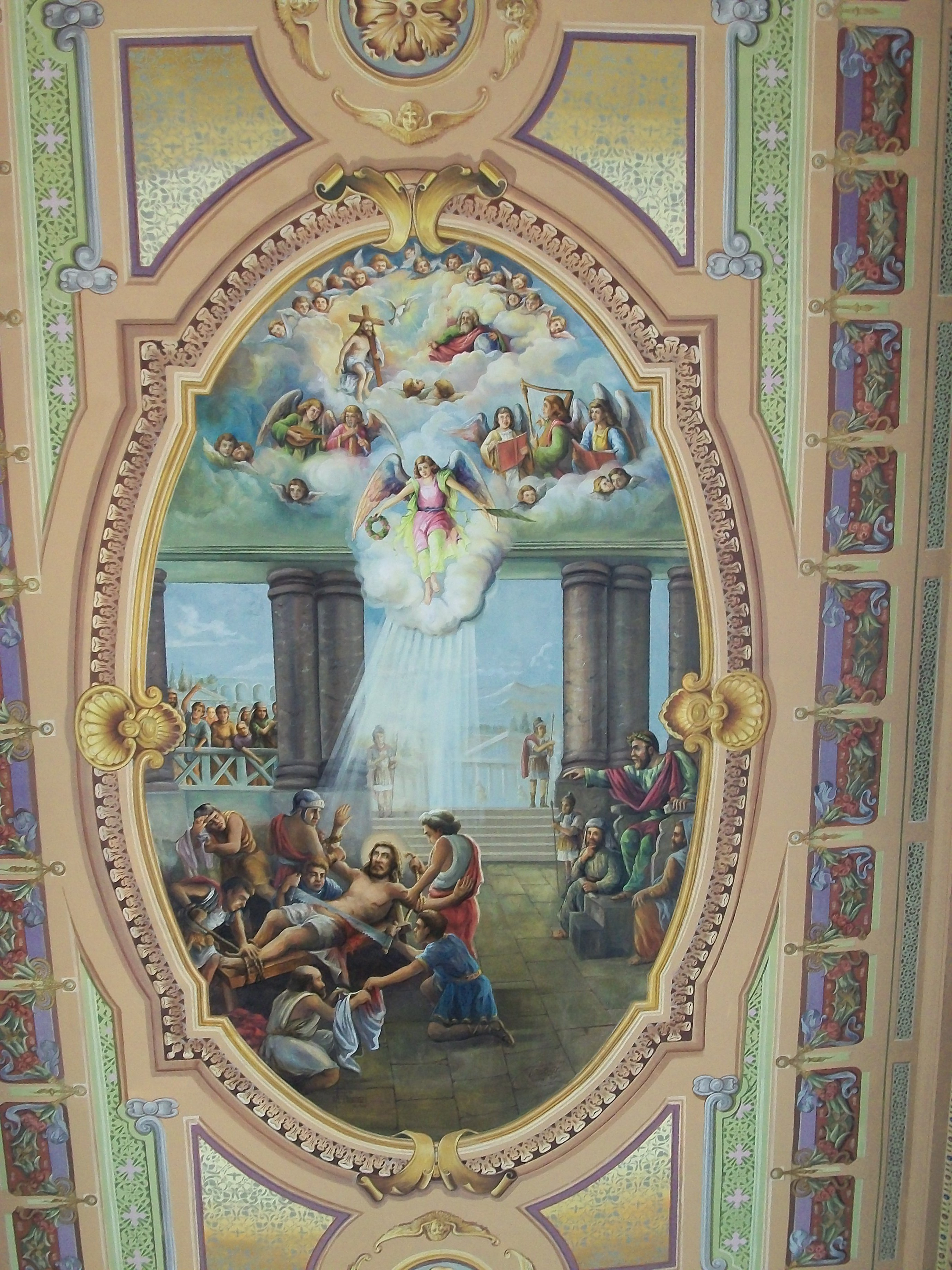 Cena "O martírio de São Simão apóstolo", pintada no forro da nave da matriz São Simão apóstolo, em São Simão, SP; fevereiro de 2010.